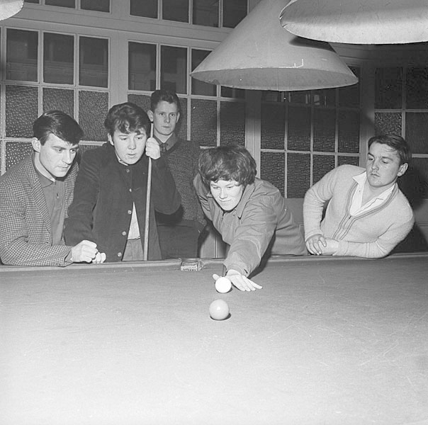 Teitl Saesneg/English title: Girls playing billiards in Dolgellau. Ffotograffydd/Photographer: Geoff Charles (1909-2002) Dyddiad/Date: 21/11/1963 Cyfrwng/Medium: Negydd ffilm / Film negative Cyfeiriad/Reference: (gch34052) Rhif cofnod / Record no.: 3471807 Rhagor o wybodaeth am gasgliad Geoff Charles yn Llyfrgell Genedlaethol Cymru More information about the Geoff Charles Collection at the National Library of Wales Mae ffotograffau Geoff Charles hefyd yn rhan o Broject Europeana Libraries Geoff Charles' photographs also form part of the Europeana Libraries Project